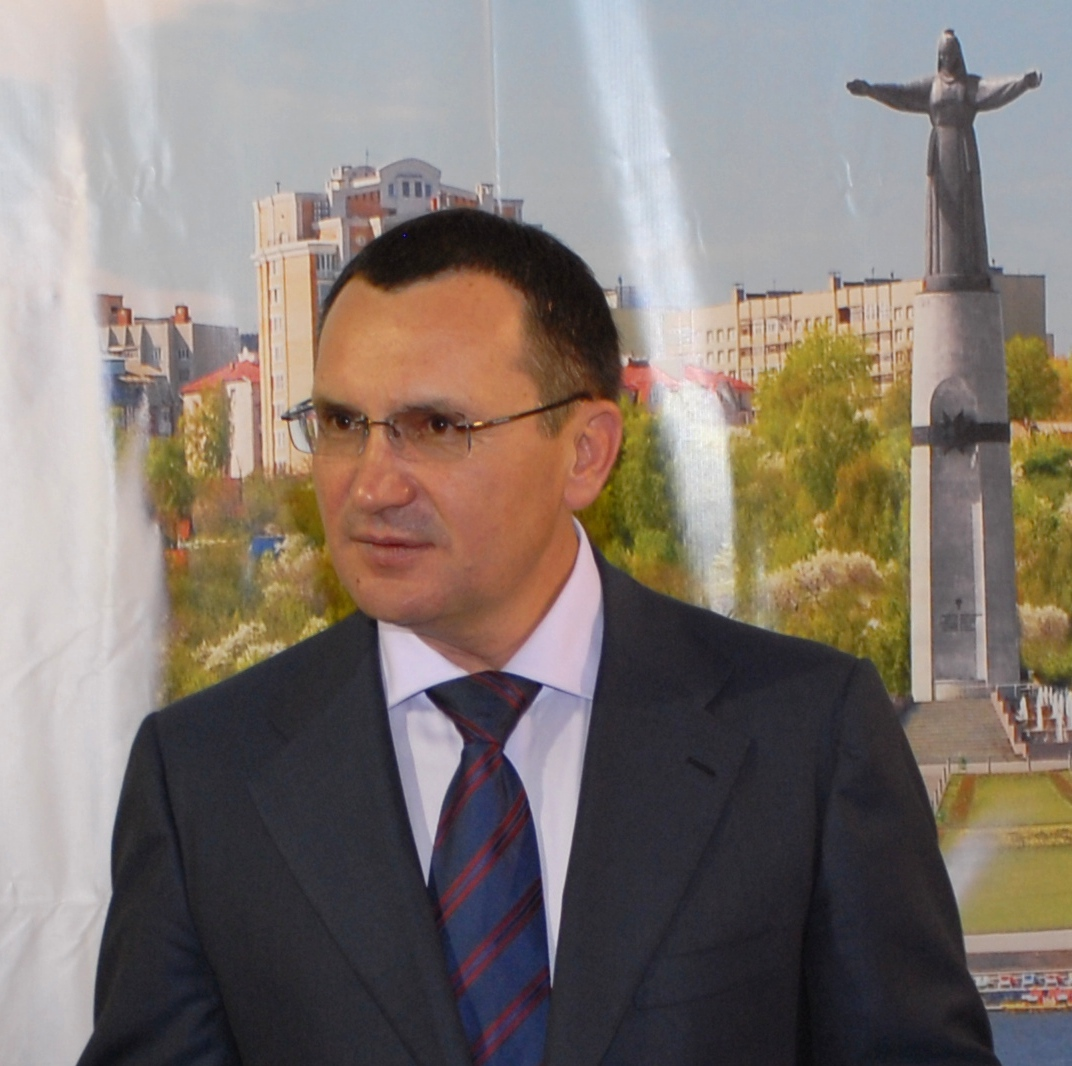 Николай Васильевич Фёдоров в выставочном комплексе «Контур» на XVII Межрегиональной выставке «Регионы – сотрудничество без границ» г. Чебоксары 23 июня 2010 (кадрированая версия)